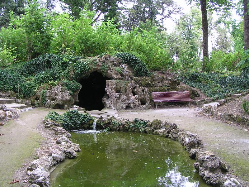 jardin public